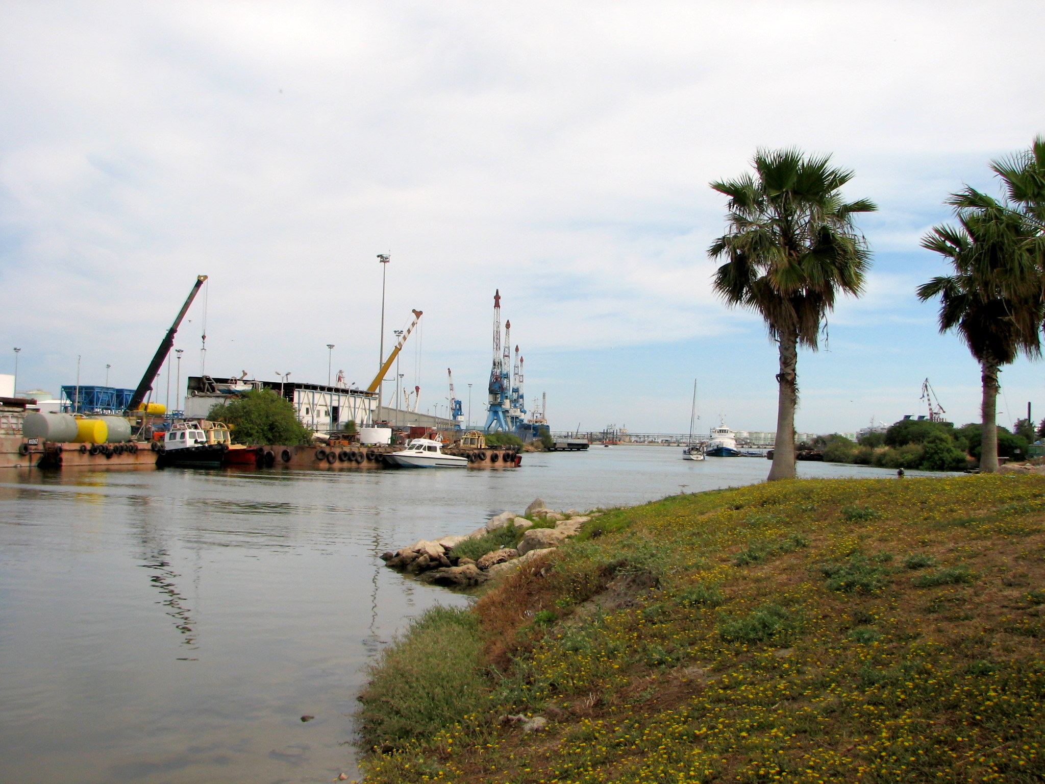 The Kishon River is a river in Israel that flows into the Mediterranean Sea at the city of Haifa.His length is 70 km. נחל קישון זורם מג'נין שבשומרון, לאורך כ-70 ק"מ, דרך עמק יזרעאל, מפער הקישון (המעבר הצר בין הכרמל לגבעות אלונים שפרעם) ועמק זבולון, עד יציאתו לים במפרץ חיפה. בשפך הנחל נמצא נמל הקישון. שטח אגן הניקוז שלו הוא השני בגודלו מבין נחלי החוף, כ-1,110 קמ"ר ולאורך חלק ניכר מאפיקו זרימתו איתנה. הנחל סבל מזיהום רב במיוחד באפיקו התחתון. בתחילת שנות ה2000 עבר הנחל שיקום באמצעות רשות נחל קישון והדגה והעופות חזרו לנחל פארק הקישון הכניסה למעגן הדייג מבט לכוון צפון מערב